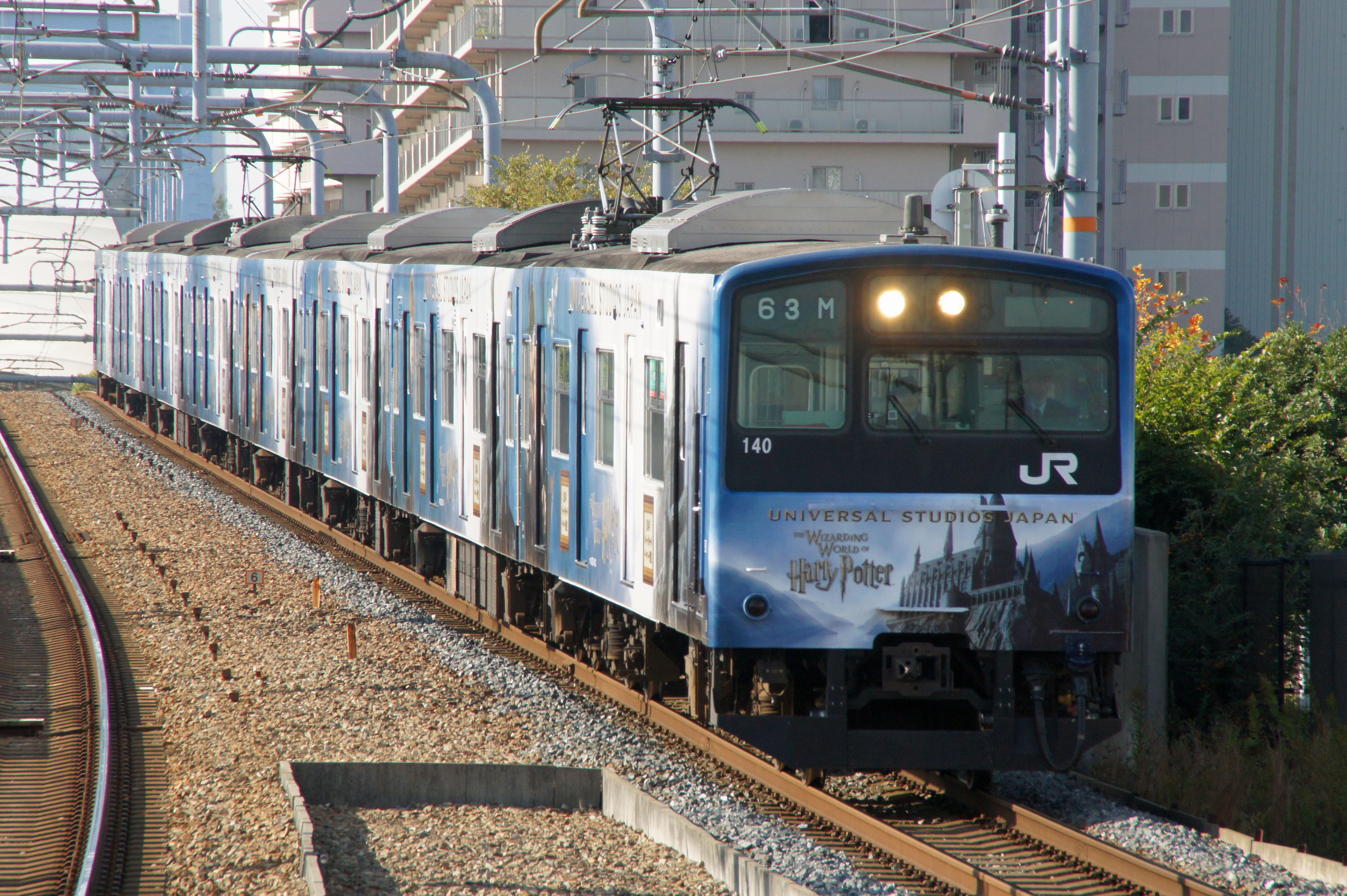 JR西日本 201系（JRゆめ咲線）ウィザーディング・ワールド・オブ・ハリー・ポッター号